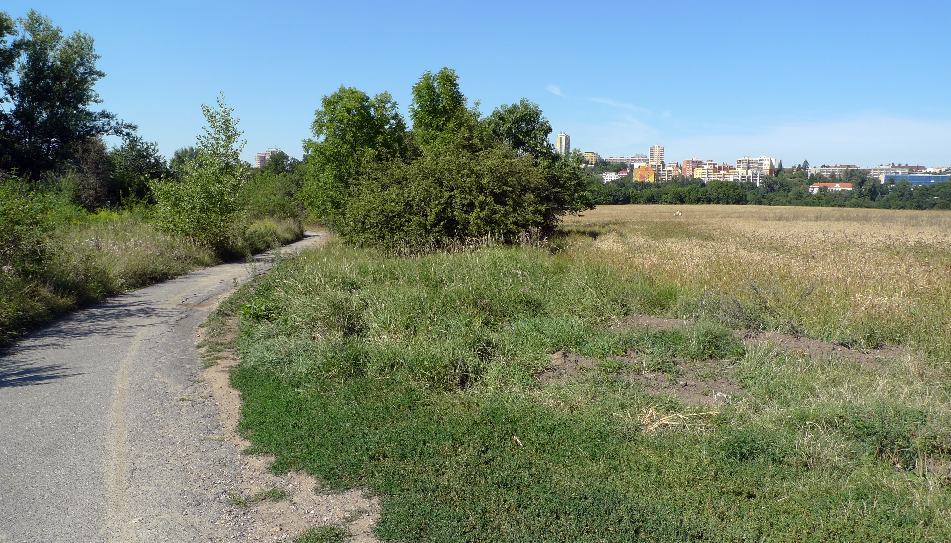 Pražské trojmezí (Praha 10) v srpnu 2012